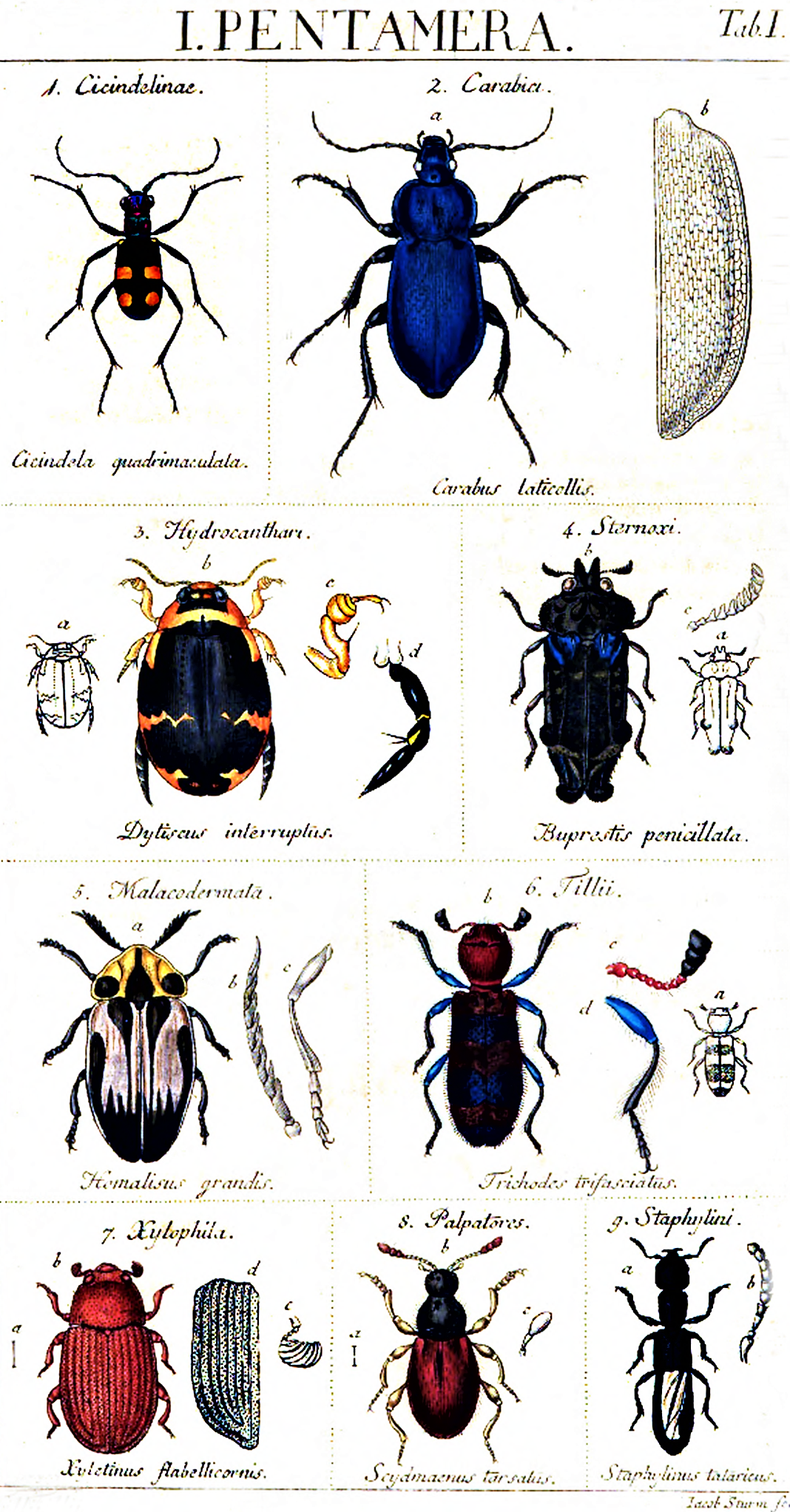 Jacob Sturm: Pentamera, 1826